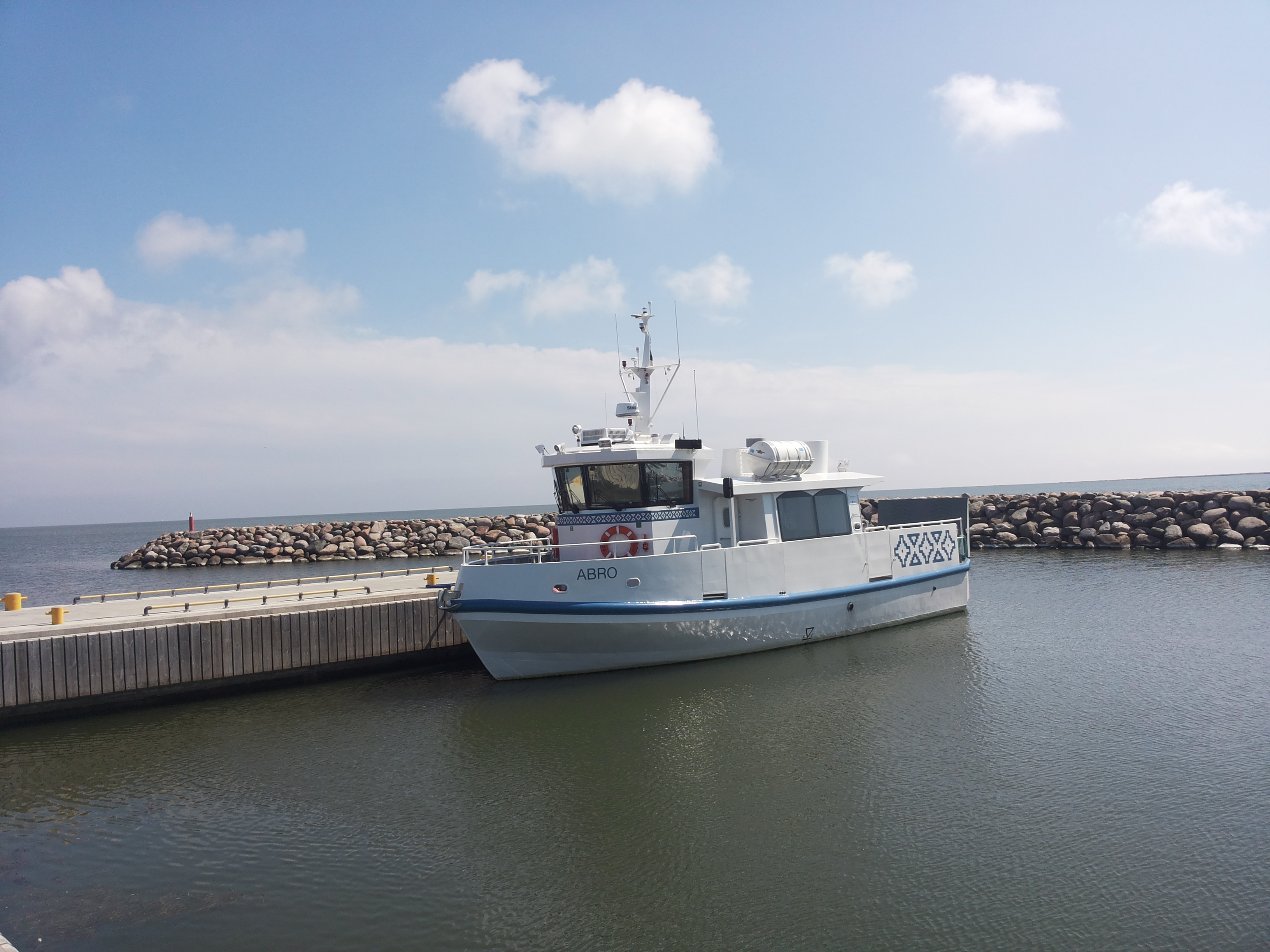 Parvlaev Abro, Abruka sadamas